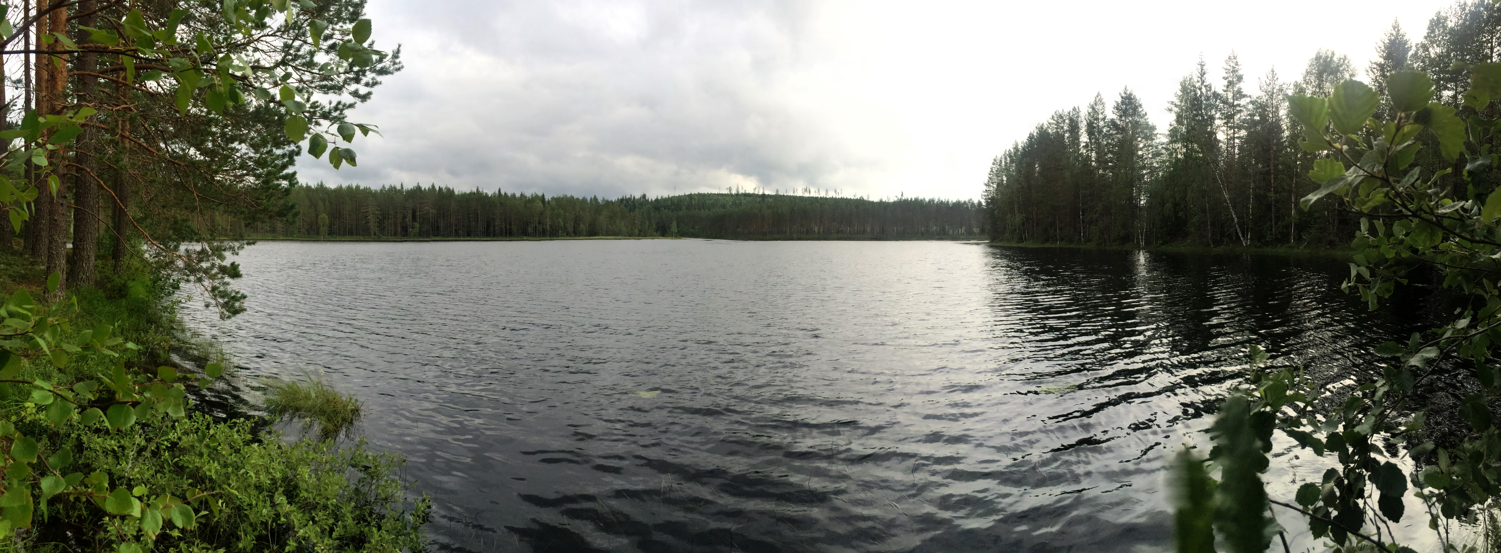 Сювялампи